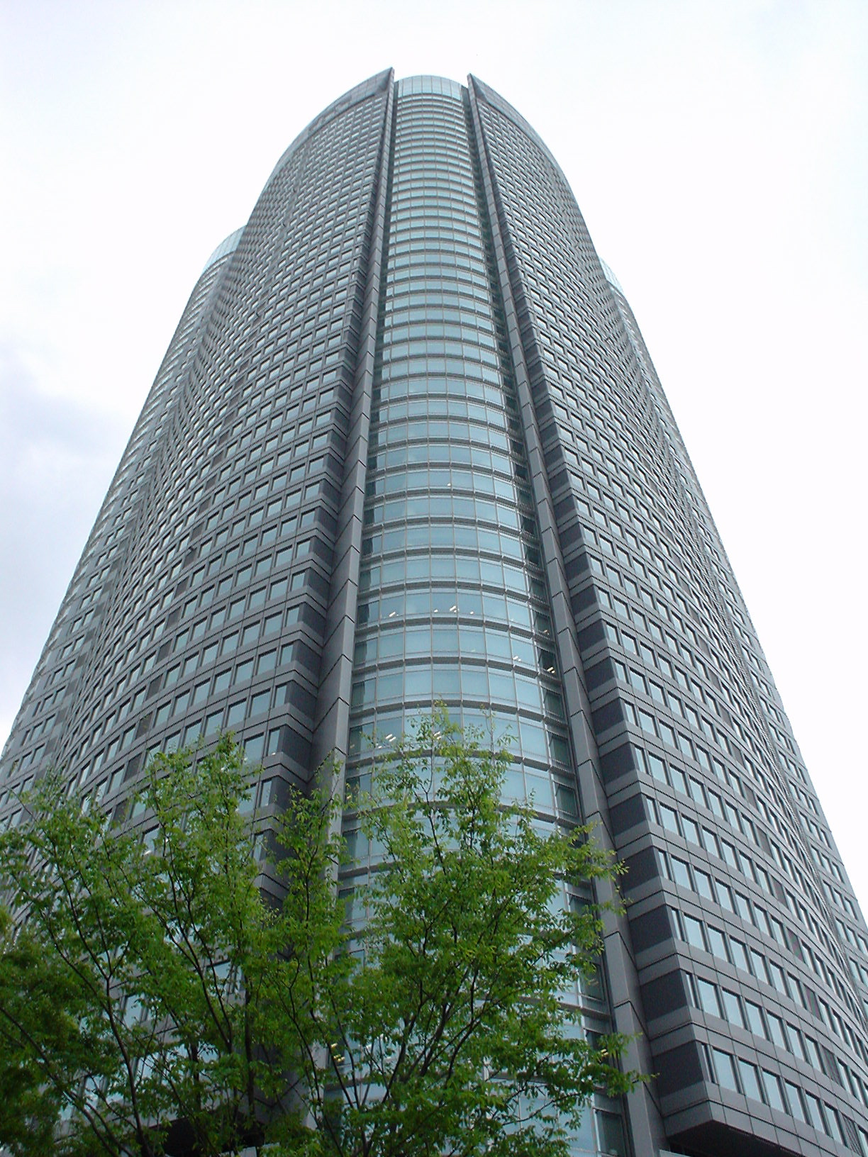 六本木ヒルズモリタワー ２００４年５月投稿者撮影